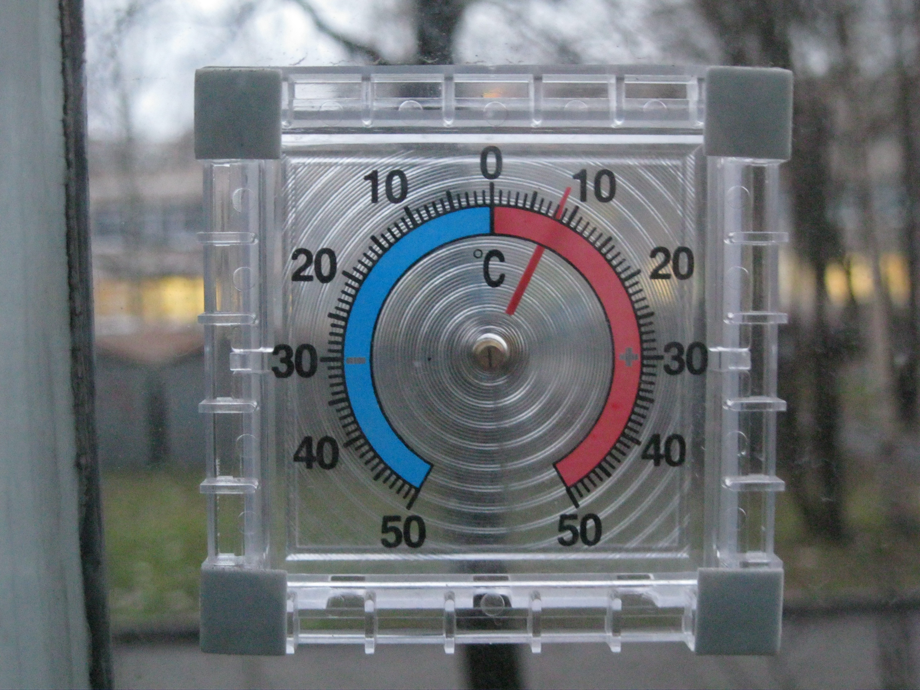 Механический термометр